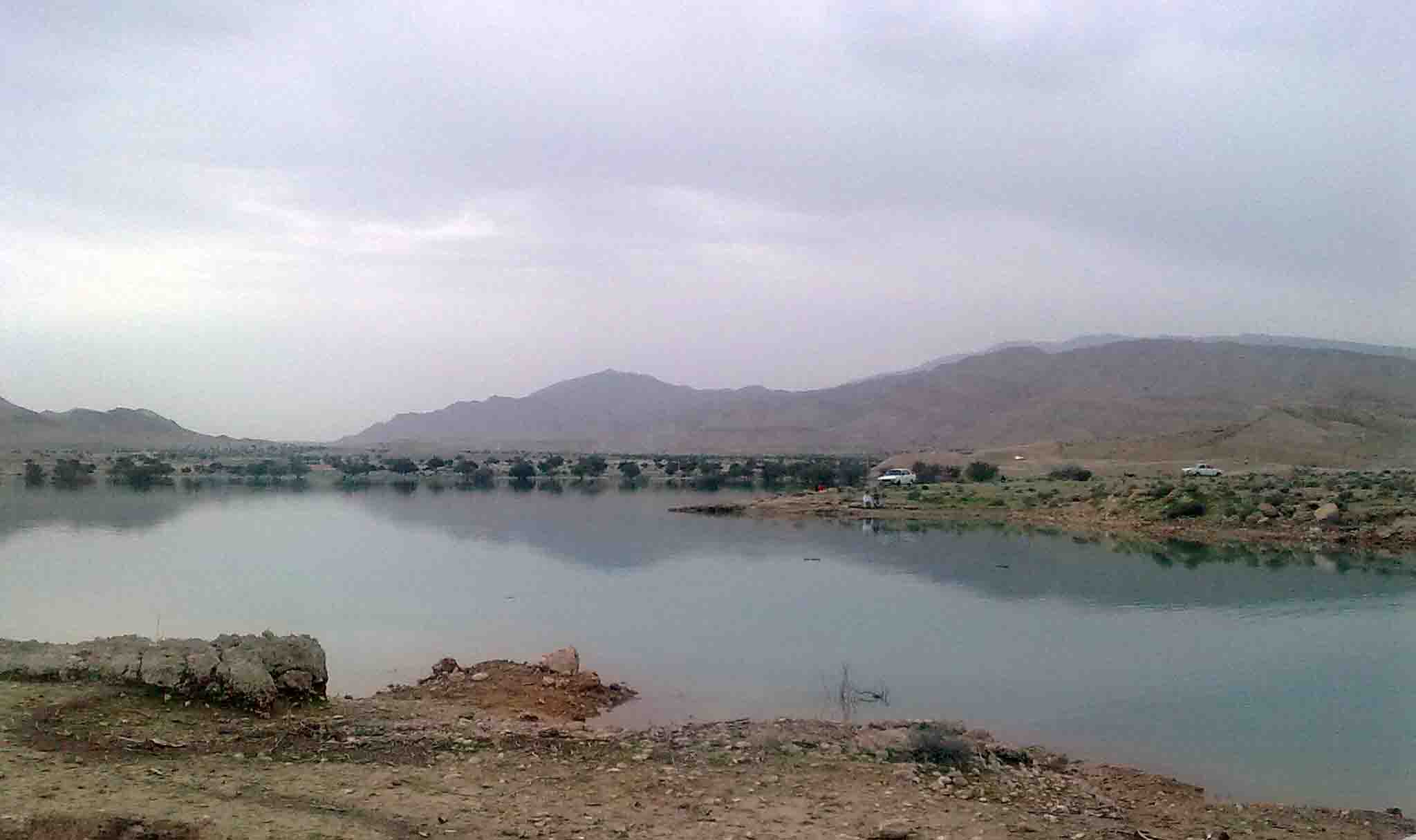 سد فرشته جان جویم